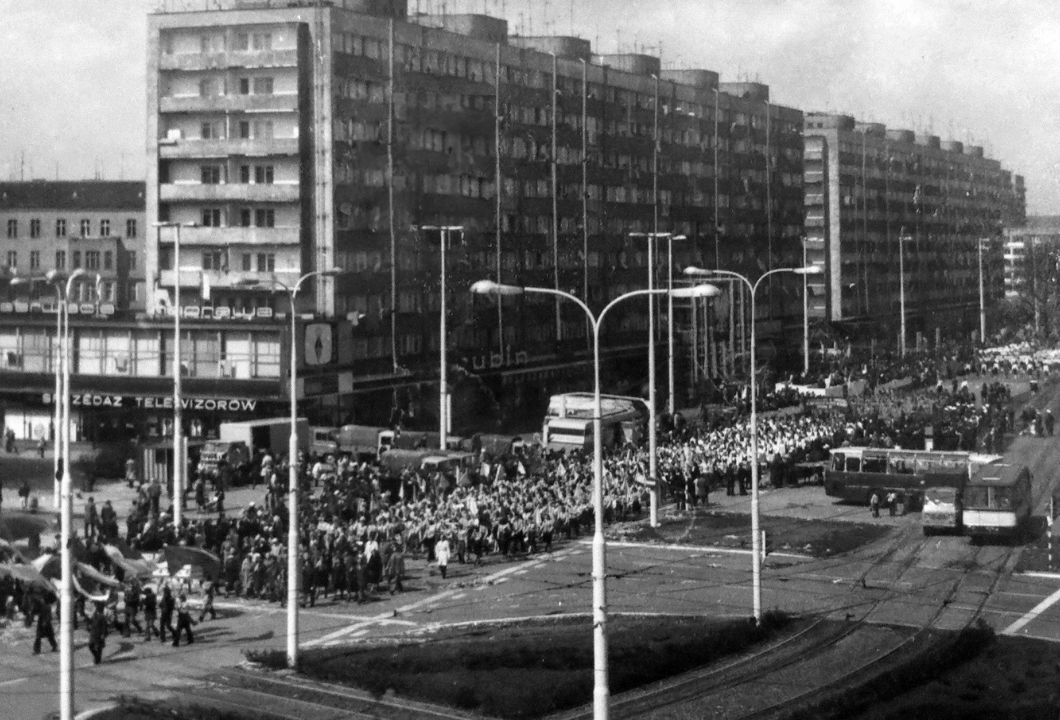 Pochód pierwszomajowy uczniów II LO im. Mieszka I w Szczecinie, 1978. Kronika II Liceum Ogólnokształcącego w Szczecinie